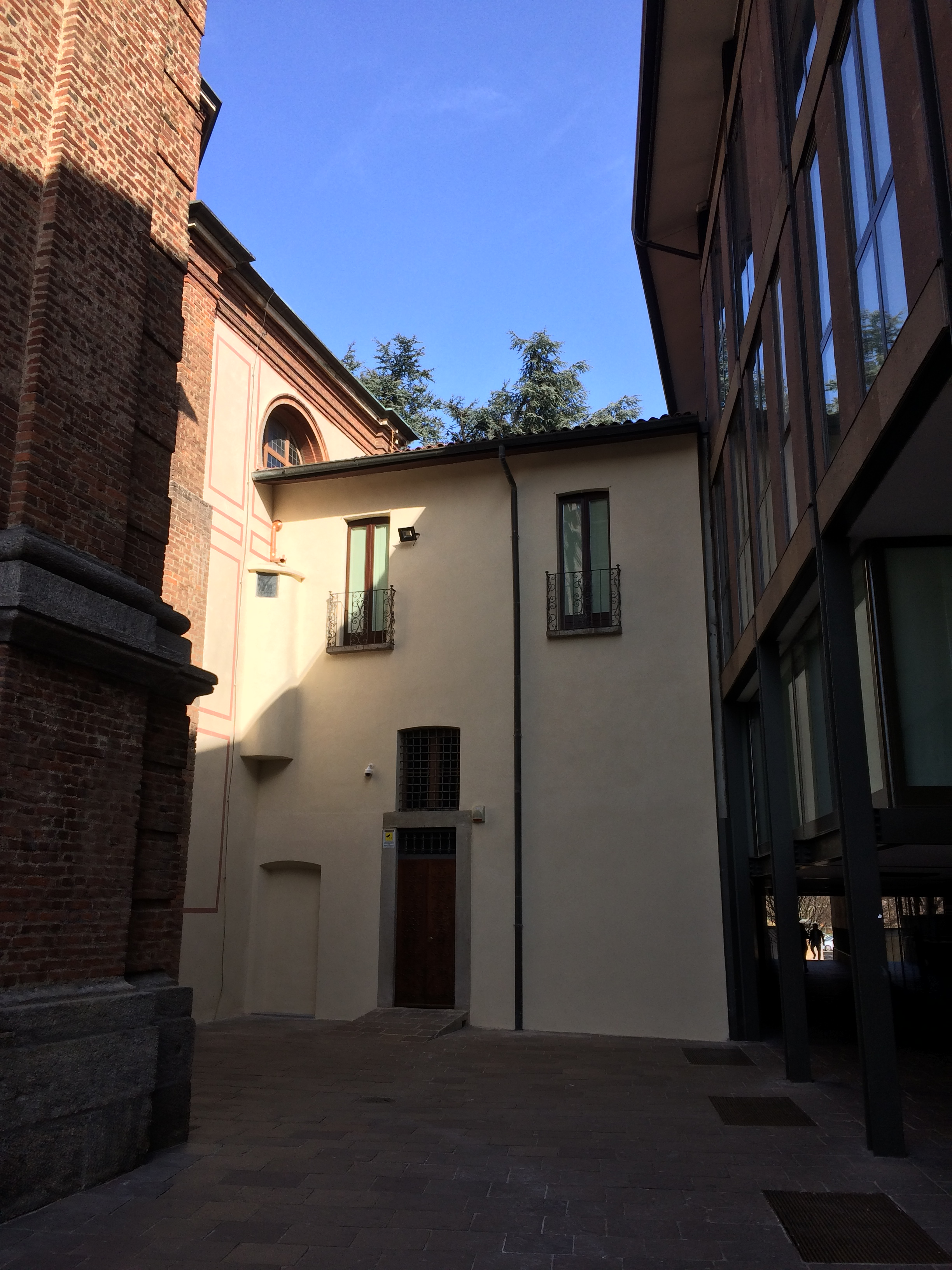 Resti dell'antica canonica di San Magno a Legnano